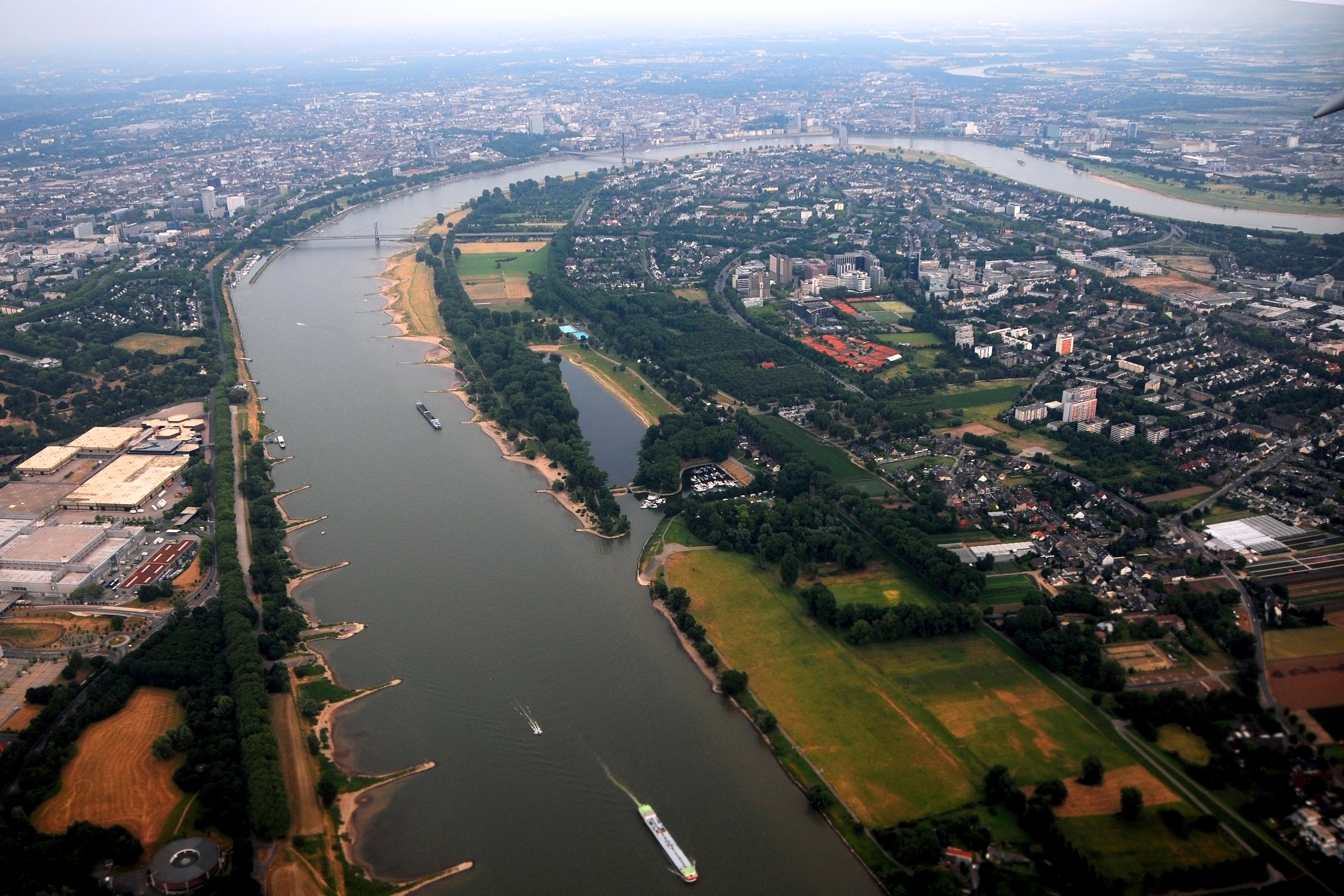 Vue aérienne du Rhin à Dusseldorf